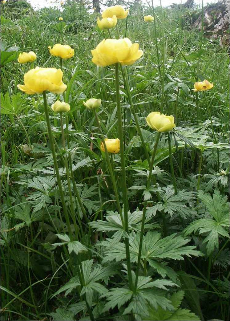 Trollblume (Trollius europaeus) Fundort: Nähe Liezener Hütte, Wörschach, Österreich